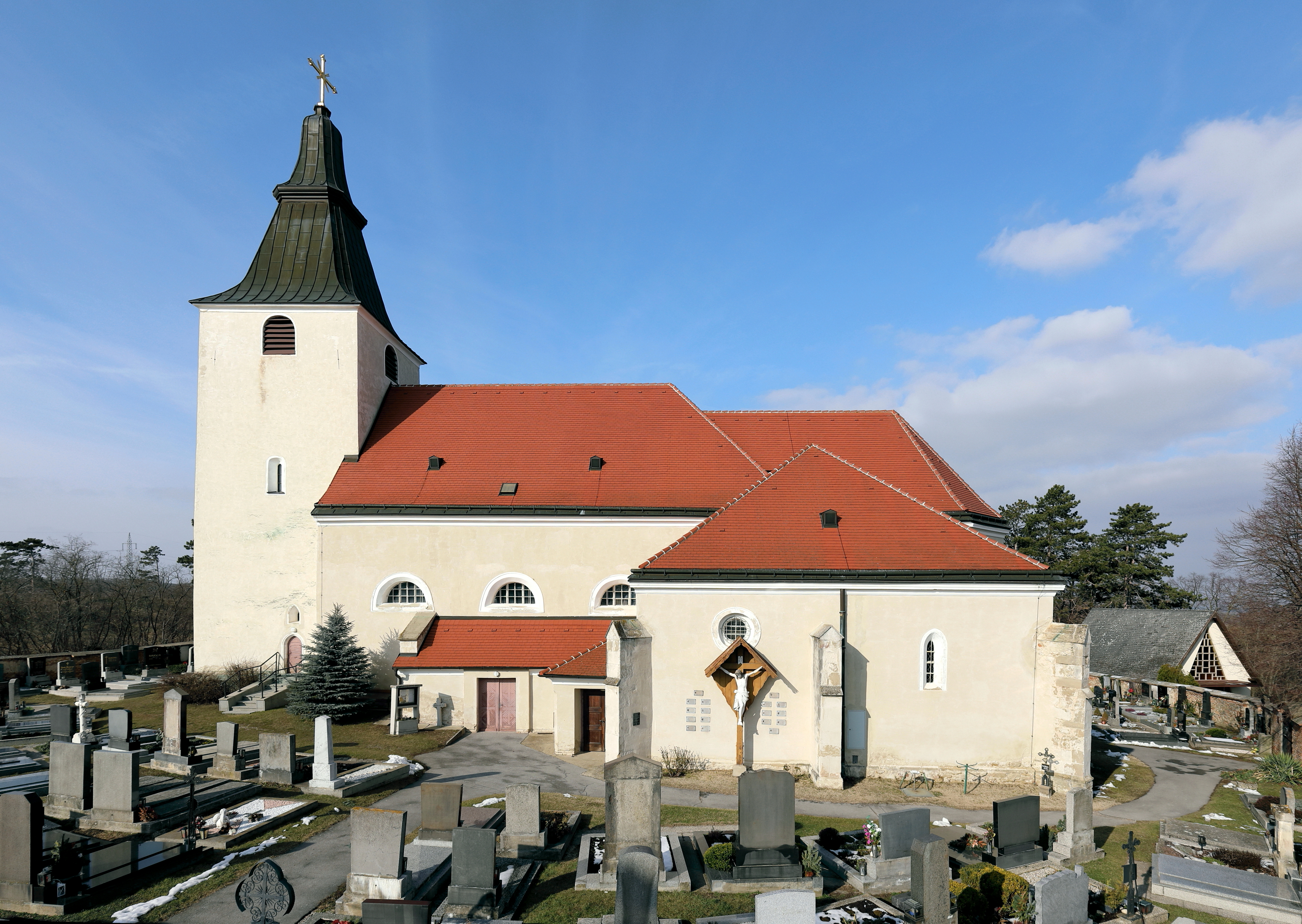 Südansicht der röm.-kath. Pfarrkirche hl. Georg in Stillfried, ein Ortsteil der niederösterreichischen Marktgemeinde Angern an der March. Eine 1669/70 barockisierte, weithin sichtbare ehemalige Wehrkirche mit einem gedrungenen Westturm aus dem 13. Jahrhundert und Ringmauer.